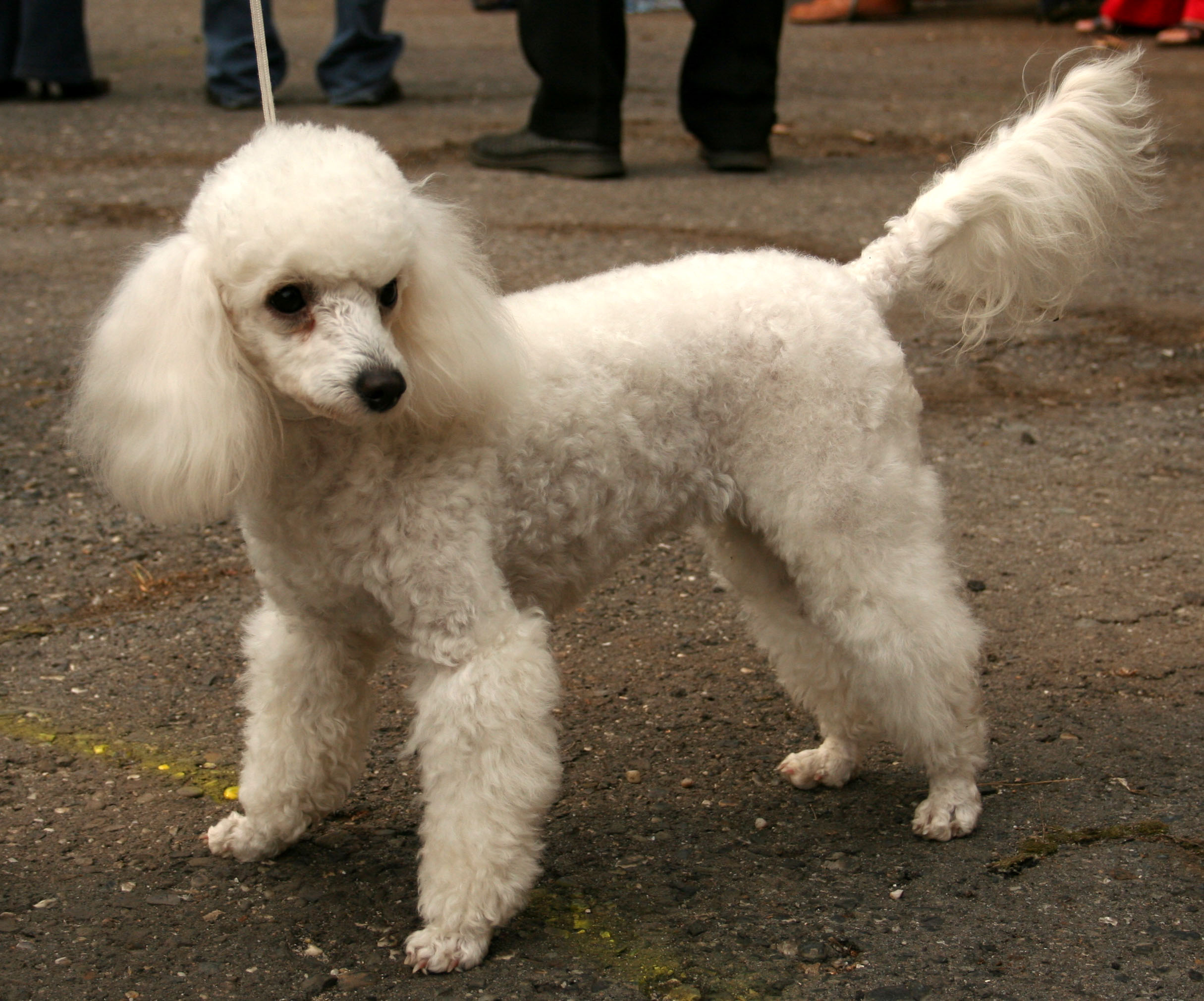 Pudel_miniaturowy biały na krajowej wystawie w Rybniku - Kamieniu